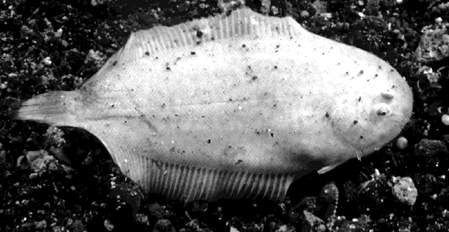 Imagen de Aseraggodes albidus en blanco y negro.